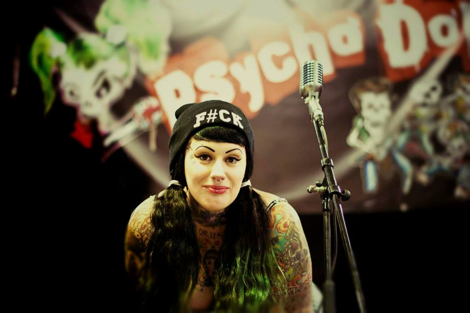 Myriam auf der Bühne